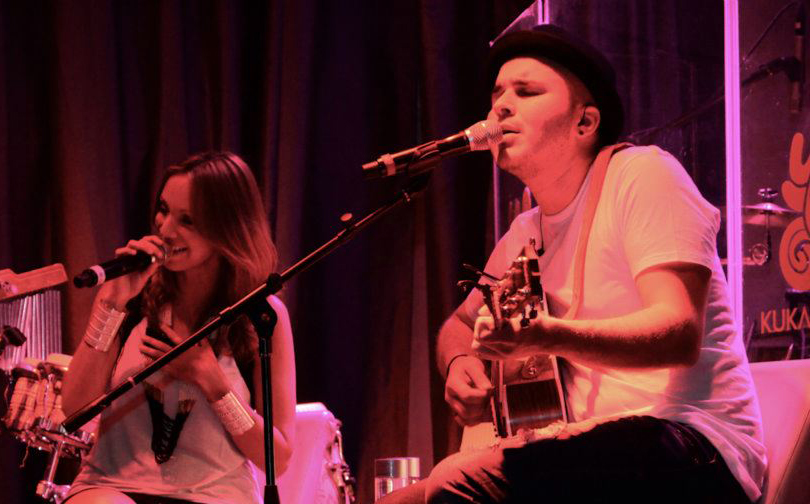 Siam actuando en el bar Kukaramakara en Miami, Florida